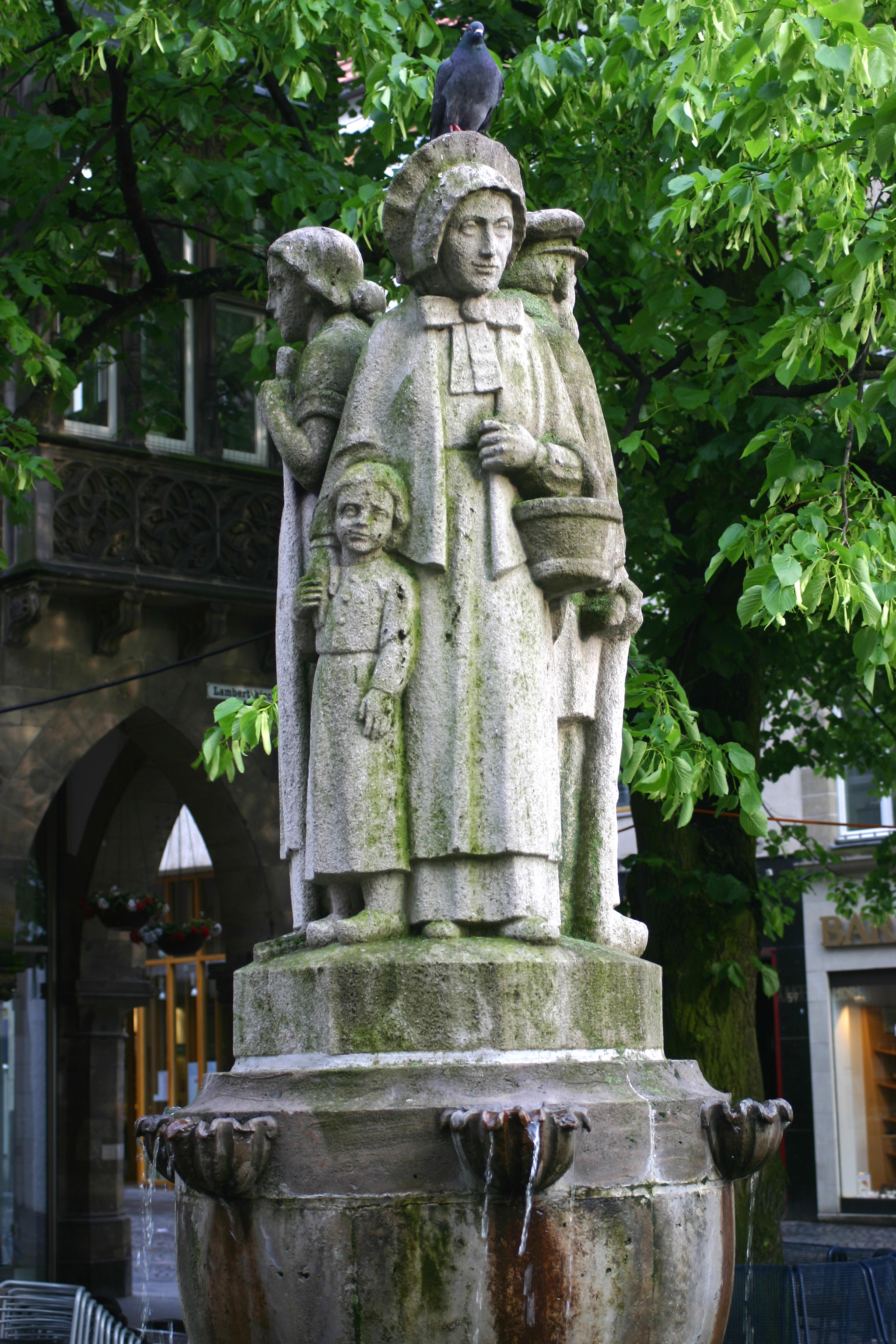 Lambertibrunnen auf dem Lambertikirchplatz